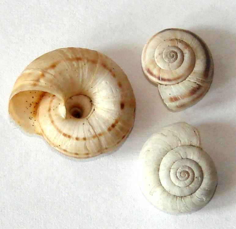 Ślimak przydrożny (Xerolenta obvia, syn. Helicella obvia)